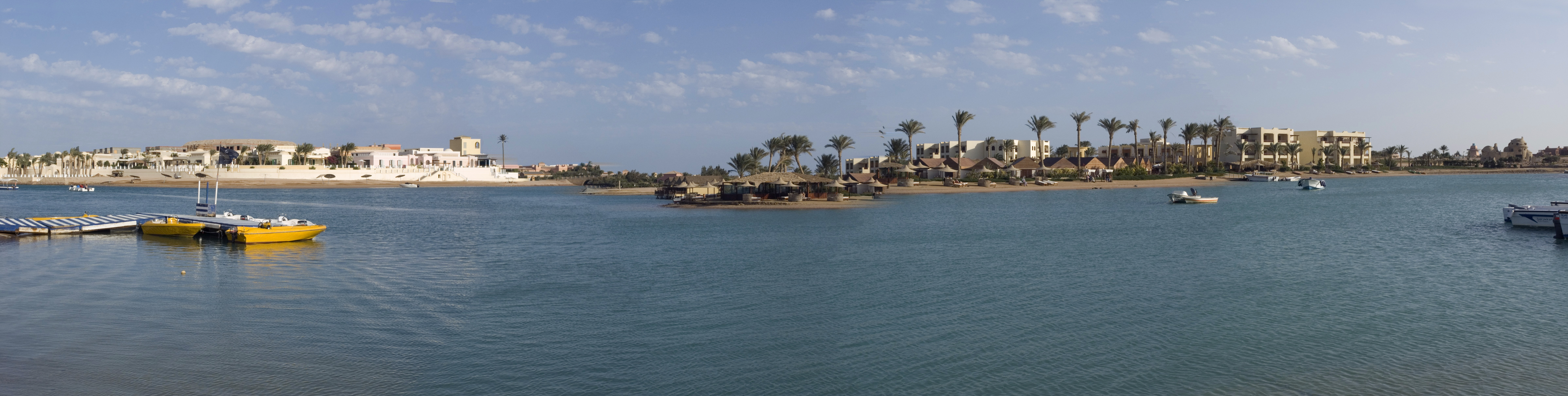 Египет, панорама Эль Гуны